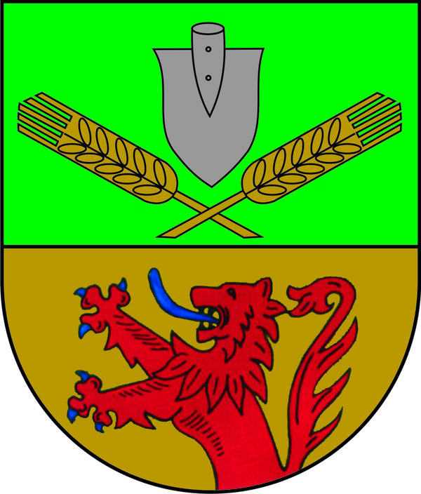 Wappen von Hellertshausen